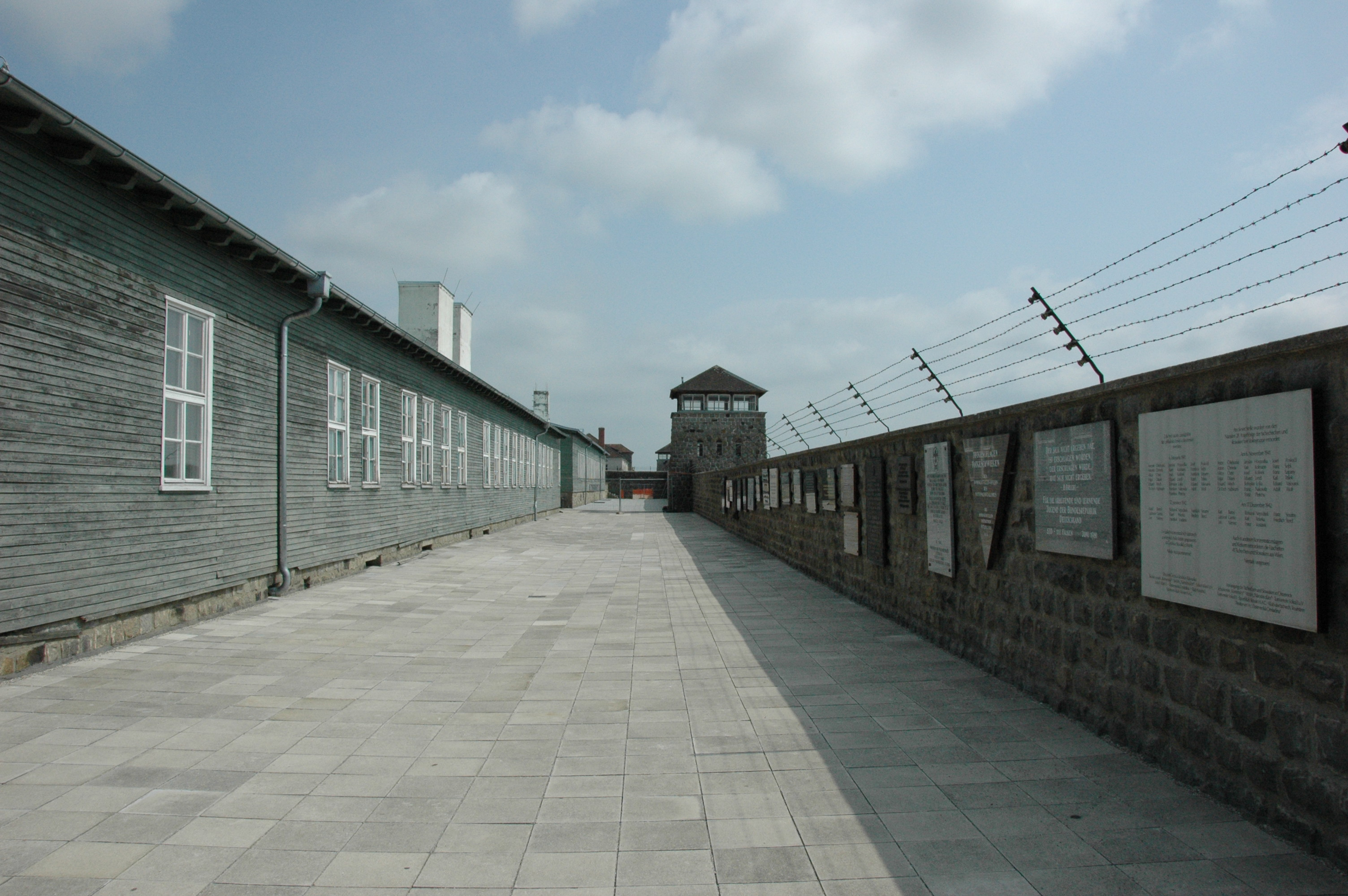 Mauthausen, concentratiekamp Categorie:Wikipedia:Afbeeldingen/Gebruiker:P.H. Louw